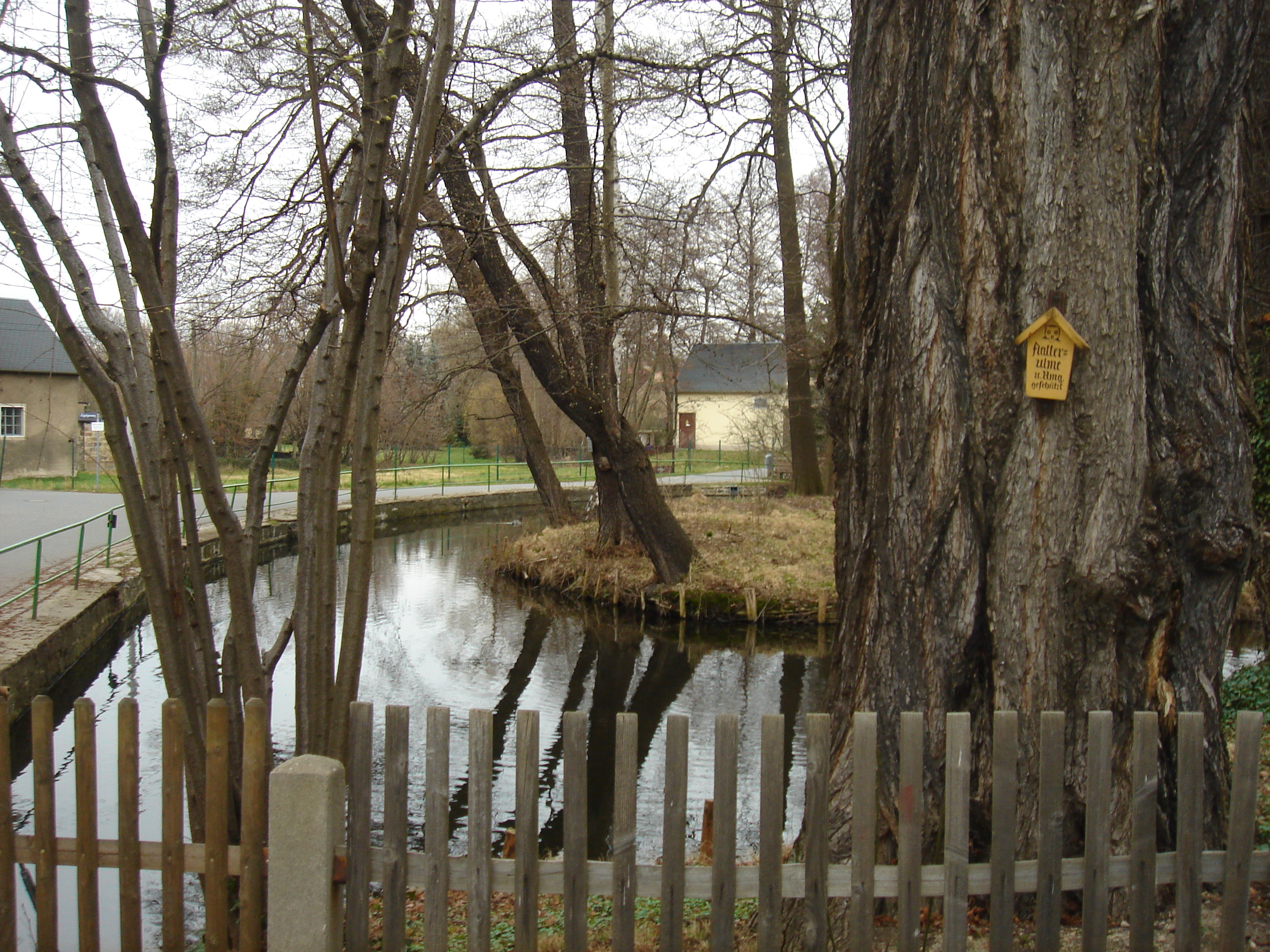 Pfarrteich Lausa mit alter, geschützter Flatterulme